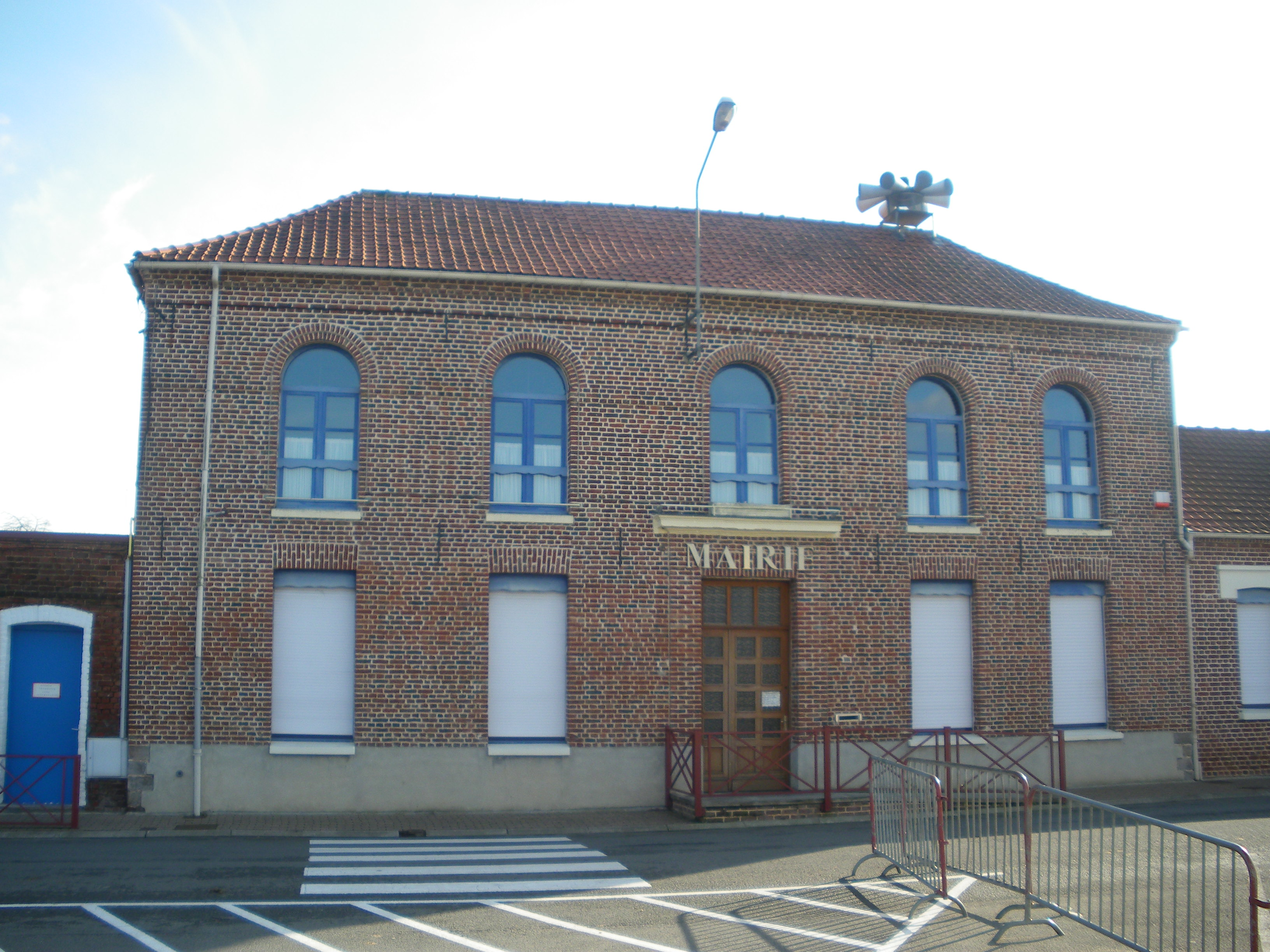 Vue de la mairie d'Hesdigneul-lès-Béthune.